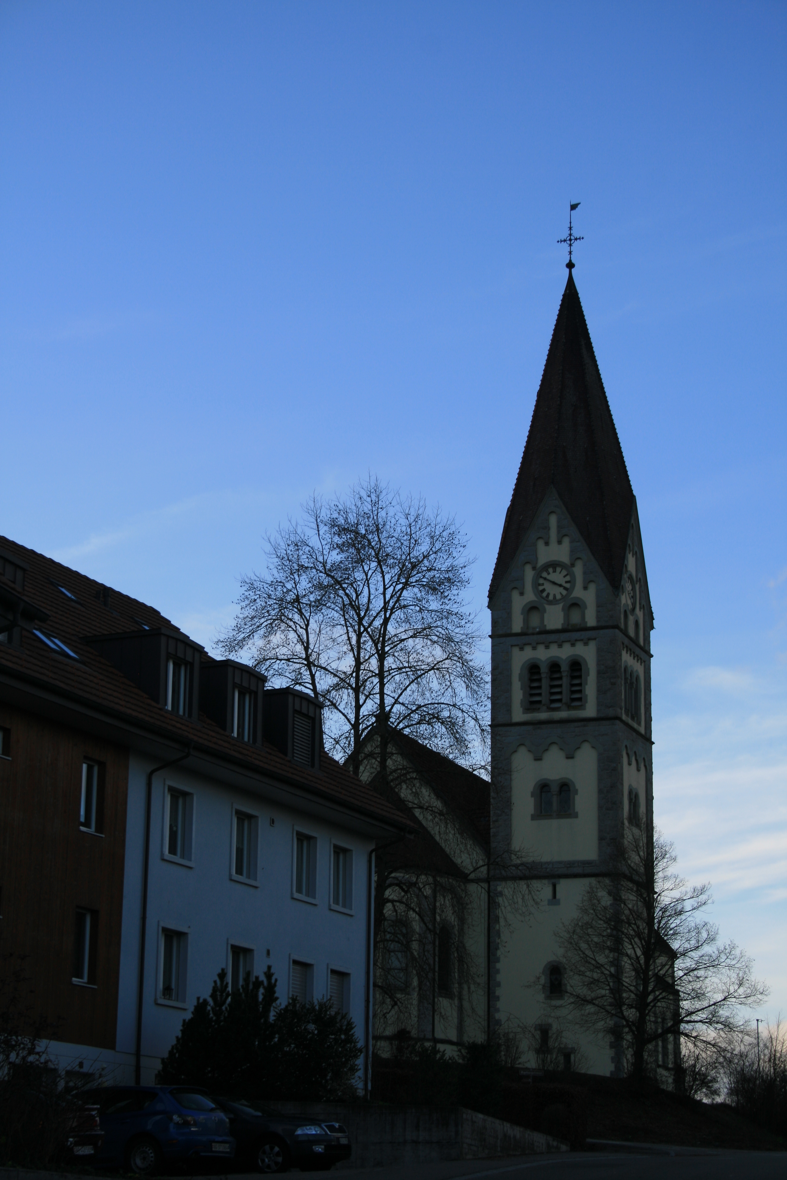 Neue Kirche, Wohlenschwil